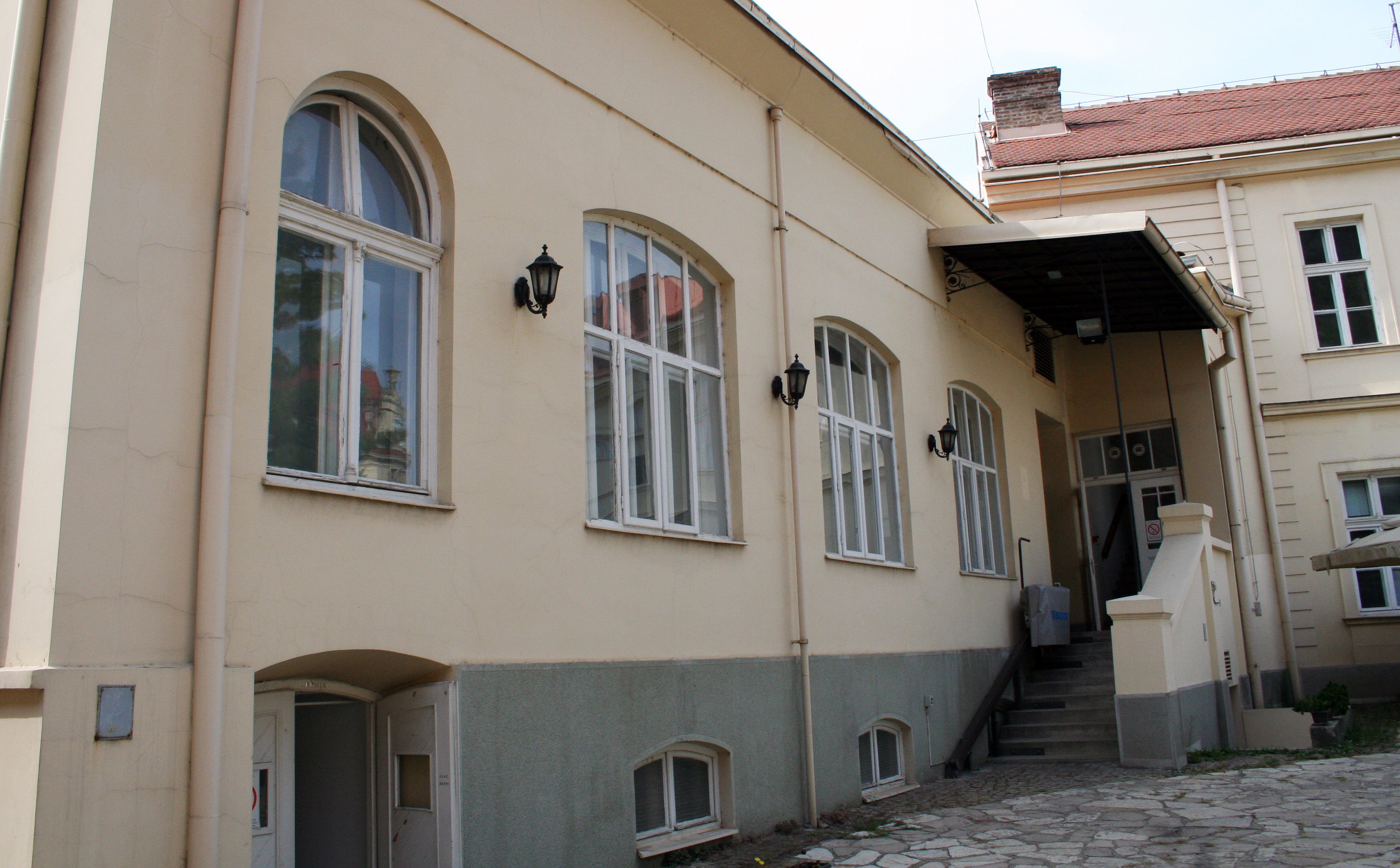 pogled na zgradu iz unutrašnjeg dvorišta